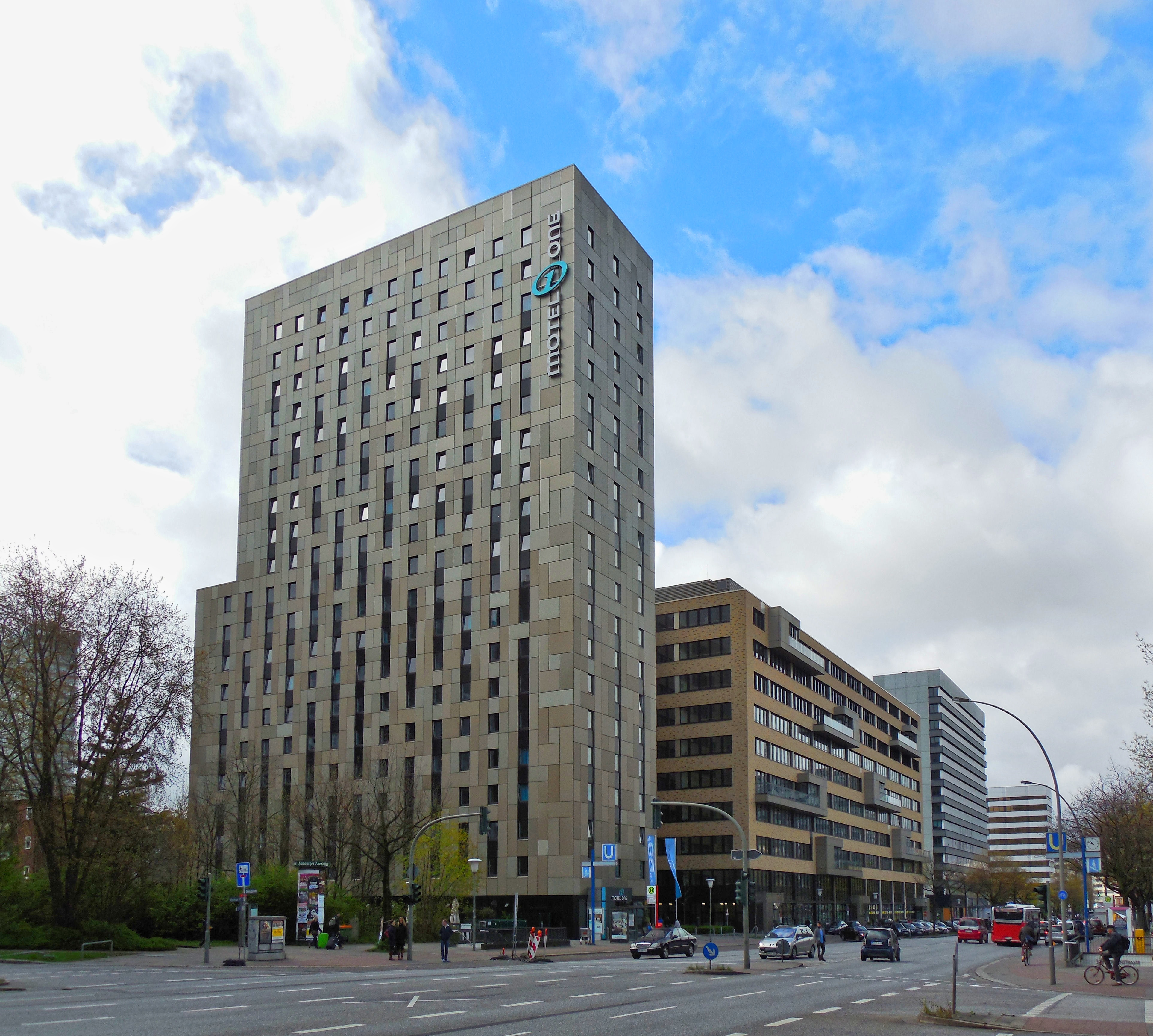 Motel One